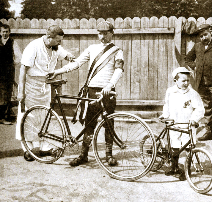 Tour de France 1903. Winner Garin Der Sieger Garin. Le vainqueur Garin. El vencedor Garin. Победитель Гарин.